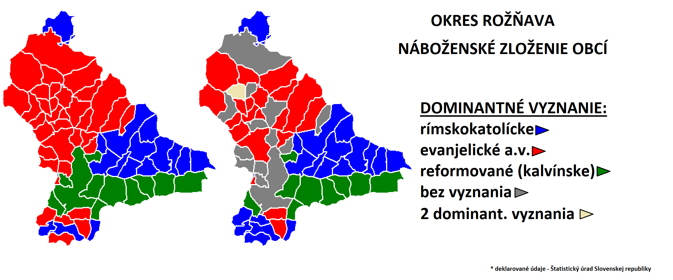 Náboženské vyznanie v obciach okresu Rožňava podľa sčítania v roku 1910 a 2011.